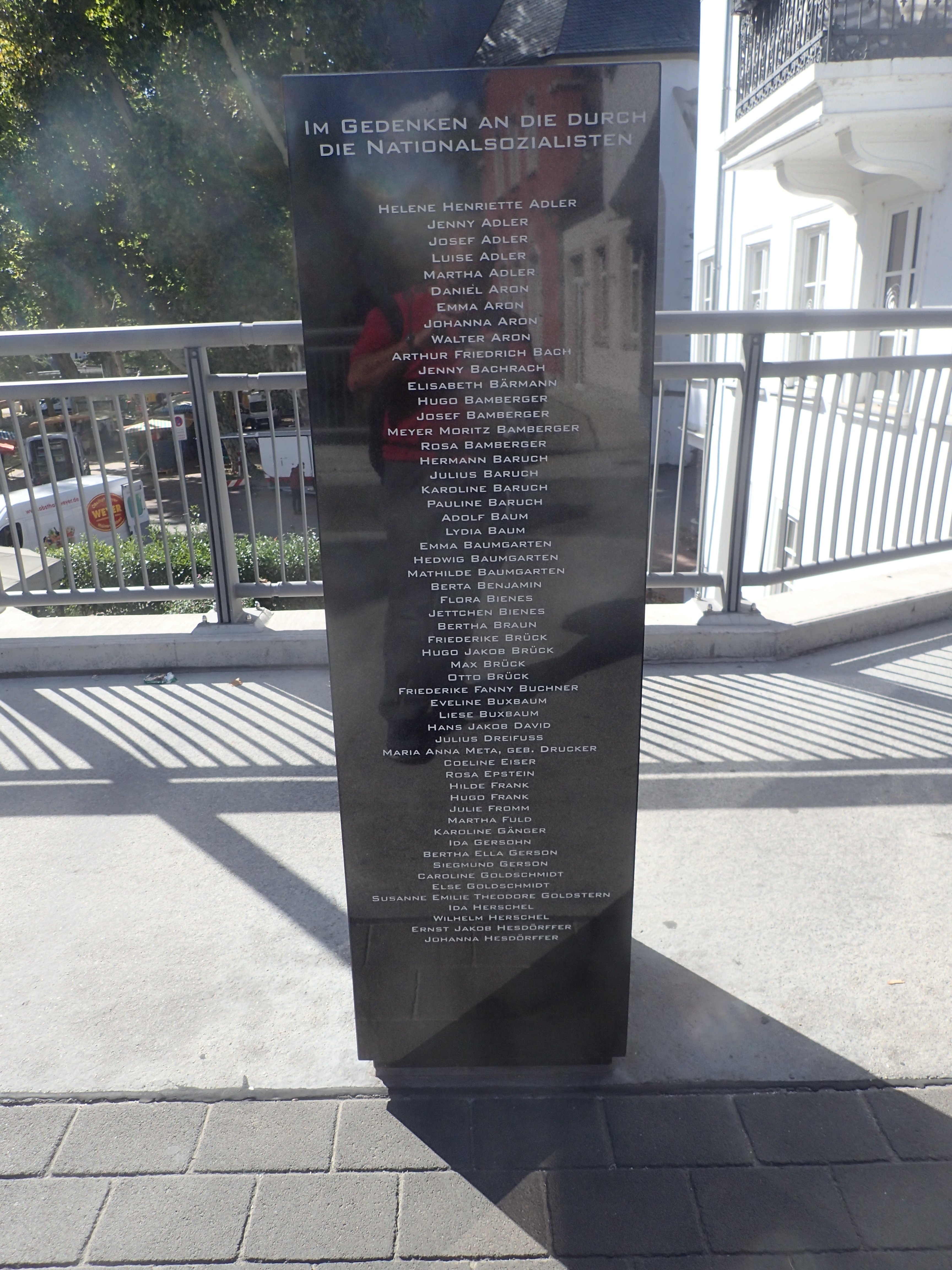 Gedenkstele für die von den Nationalsozialisten ermordeten jüdischen Mitbürger der Stadt Bad Kreuznach Seite 1